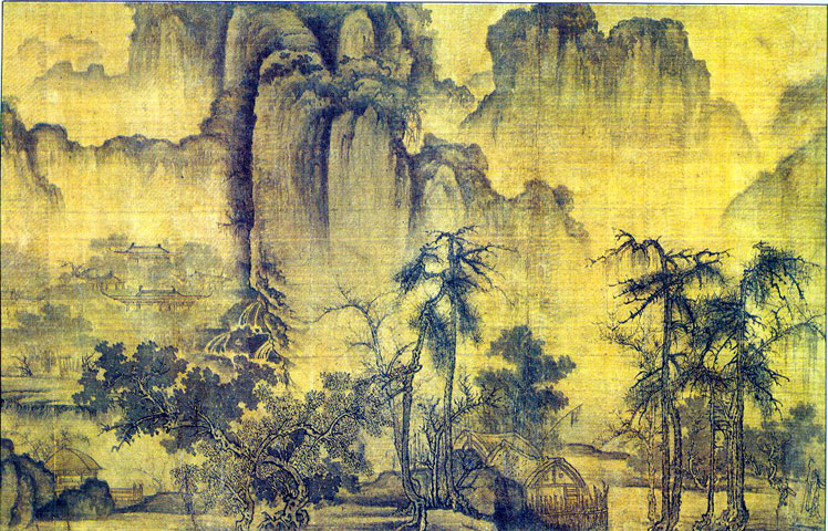 [宋] 王诜 溪山秋霁图（局部） 绢本淡设色 纵26厘米 横206厘米